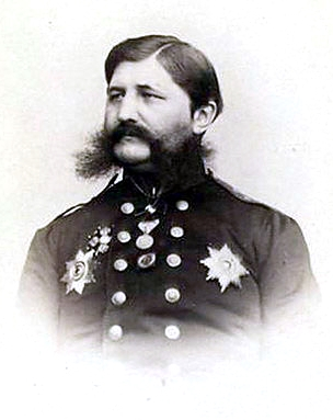 Оболенский, Дмитрий Александрович